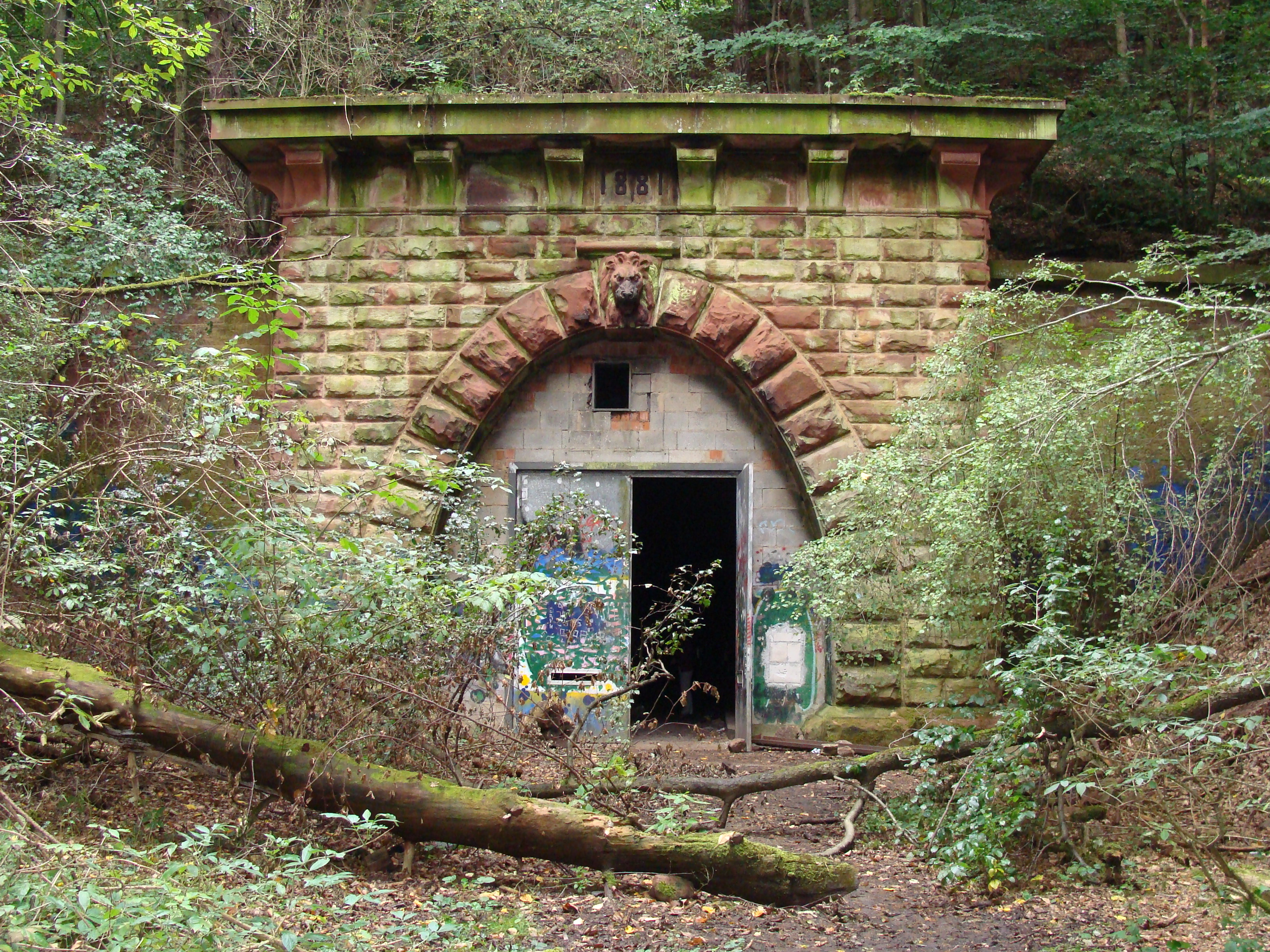 Bettingbergtunnel - Westeingang (ehemalige Bahnstrecke Lohr–Wertheim)